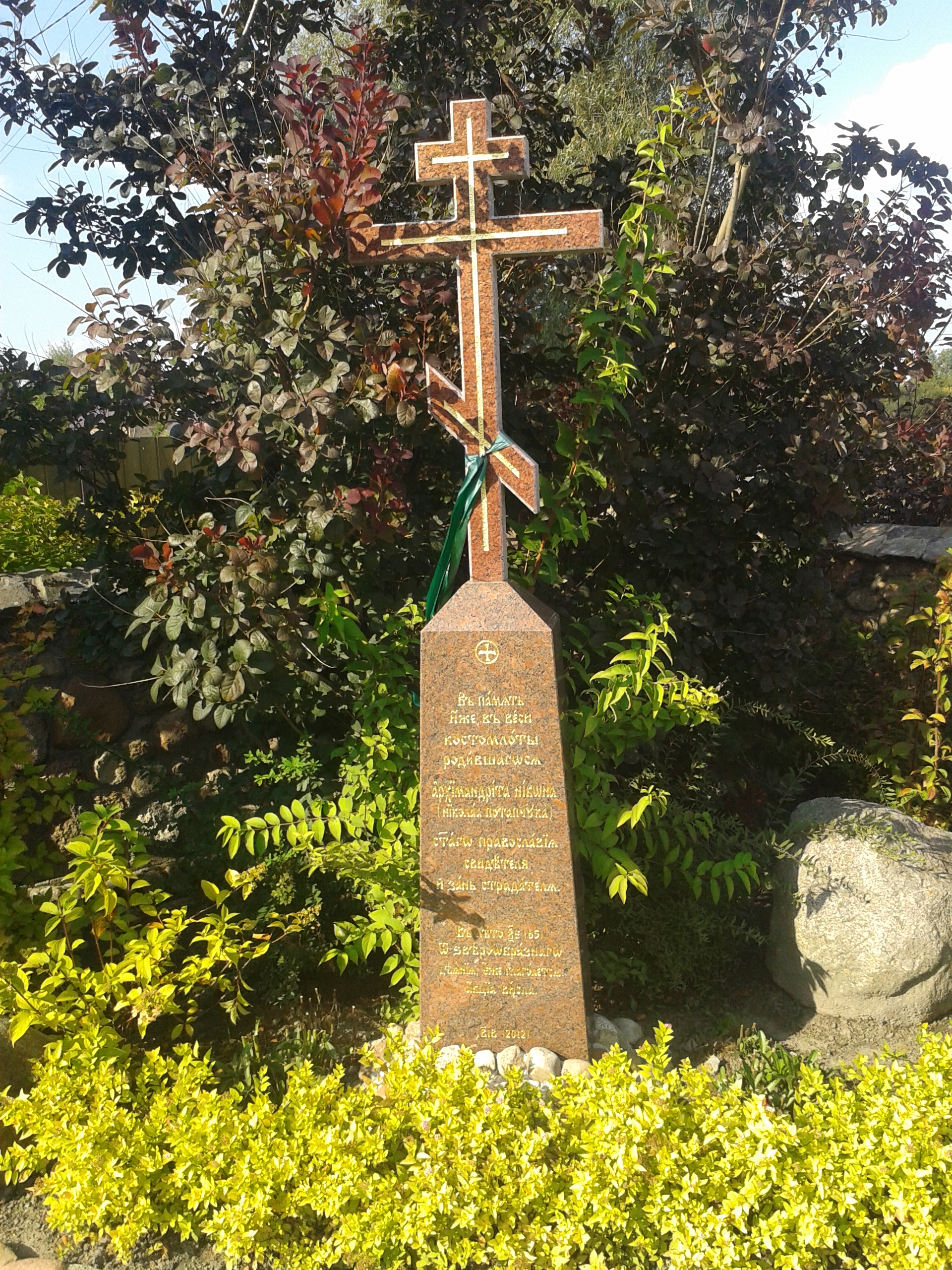 Pomnik pamięci archimandryty Nikona (Potapczuka) na terenie monasteru w Kostomłotach